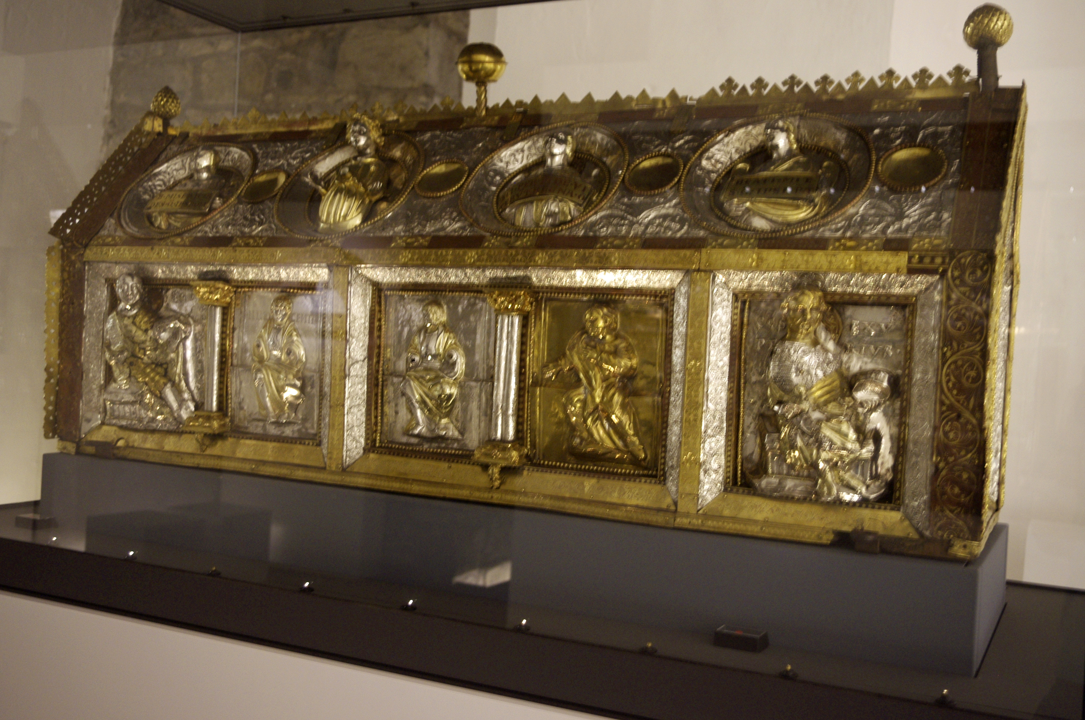 Trésor de la collégiale Notre-Dame, Huy - châsse de saint Mengold, 1172, orfèvre: Godefroid de Huy